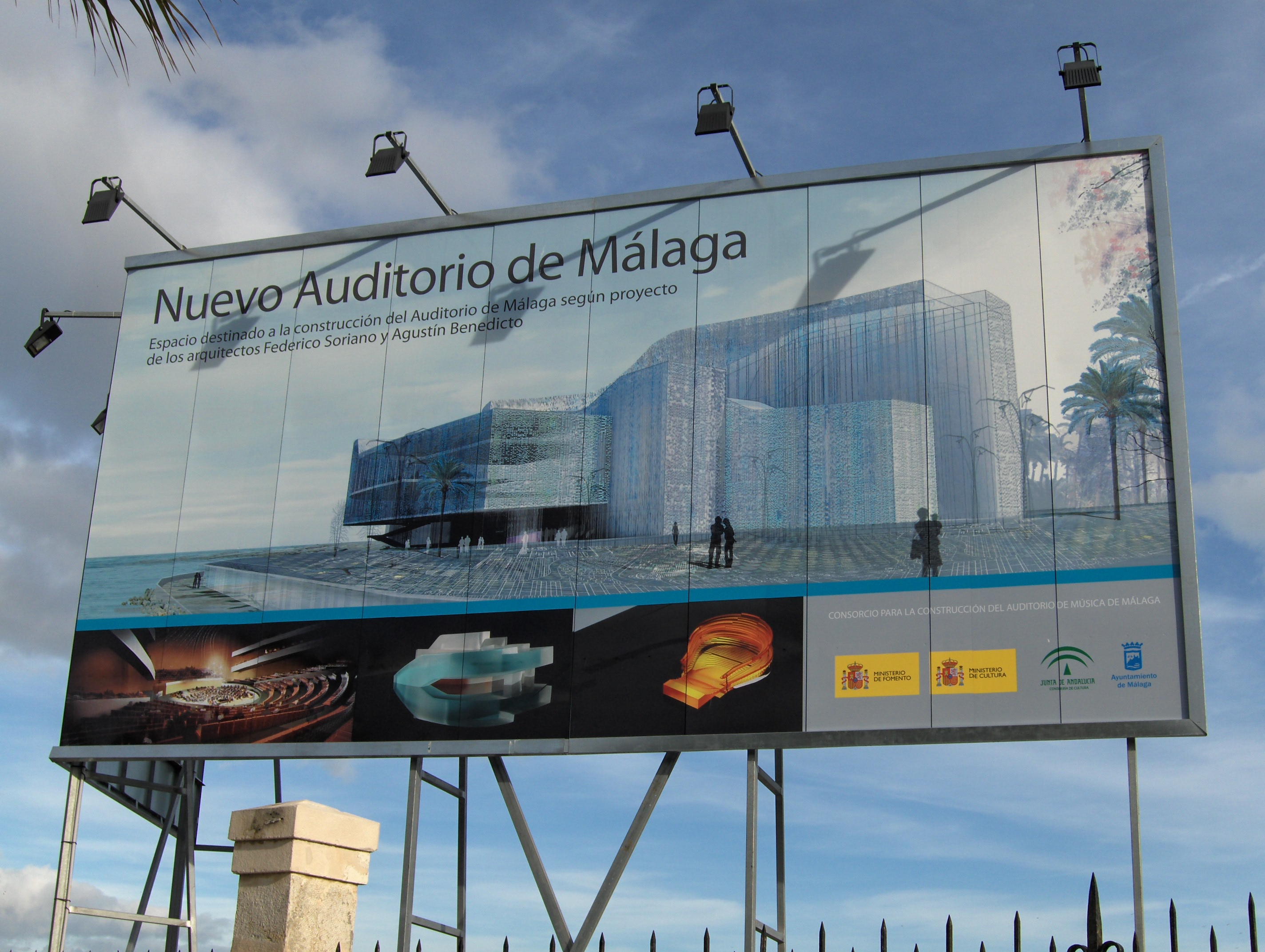 Cartel anunciando el futuro Auditorio de El Bulto, Málaga, España.